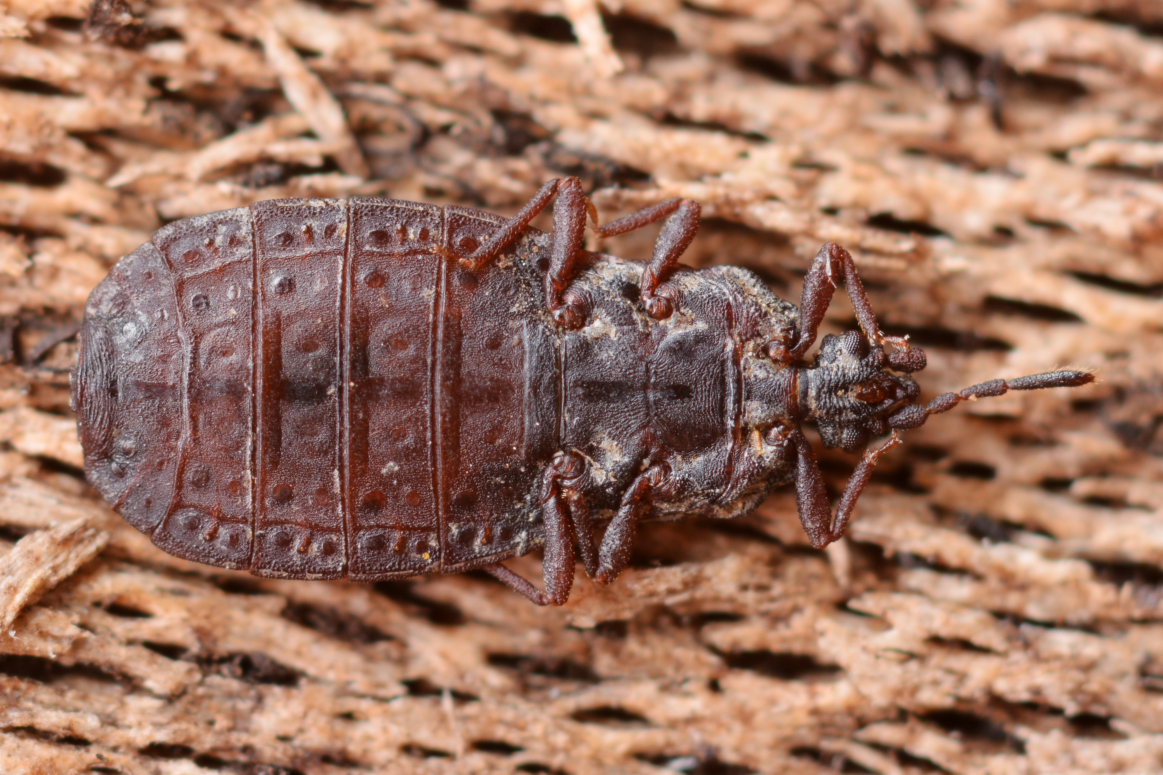 Flat bug - Aneurus avenius (ventral face). Hemiptera - Aradidae